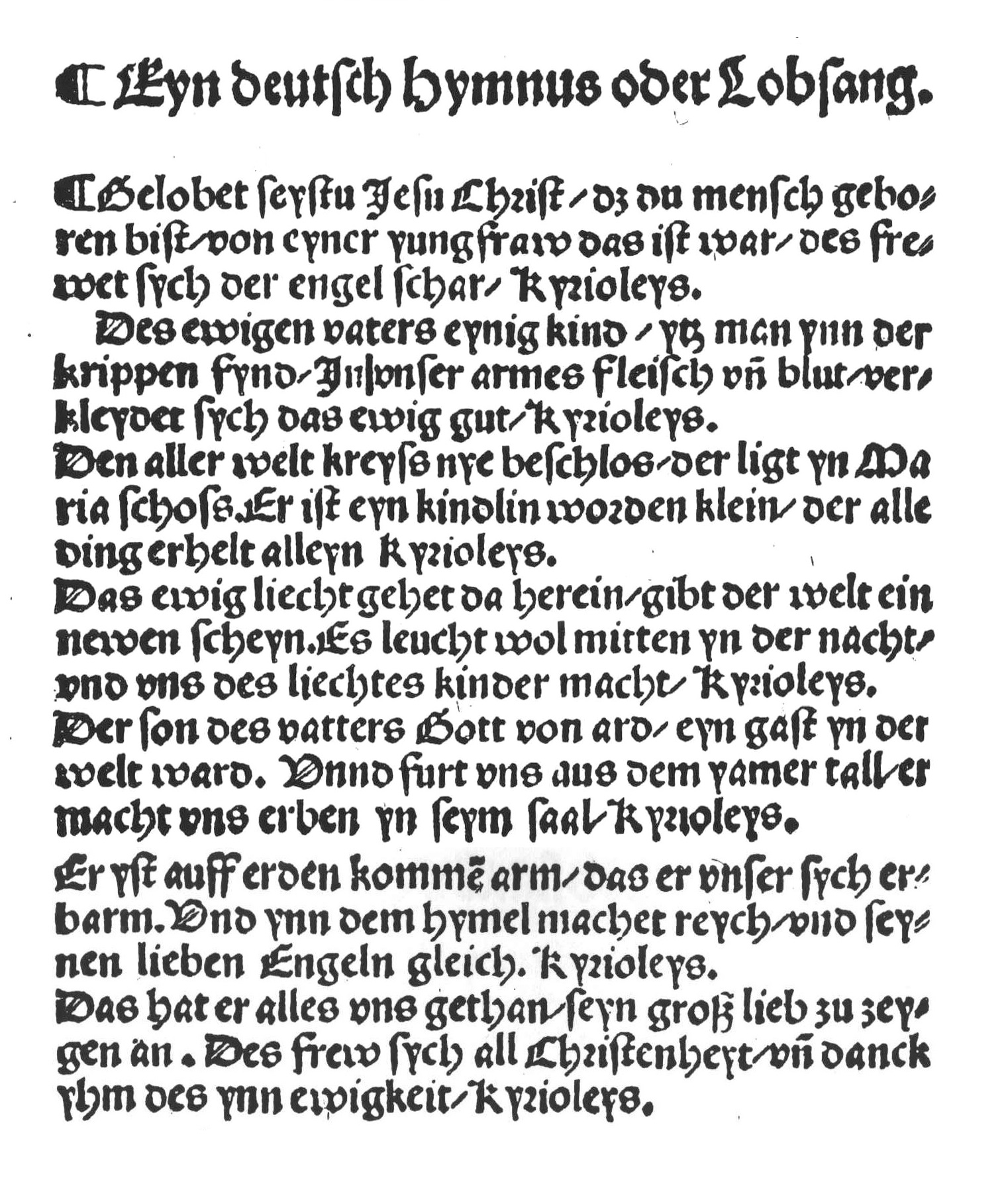 Martin Luthers Weihnachtslied Gelobet seist du, Jesu Christ, Erstdruck 1524